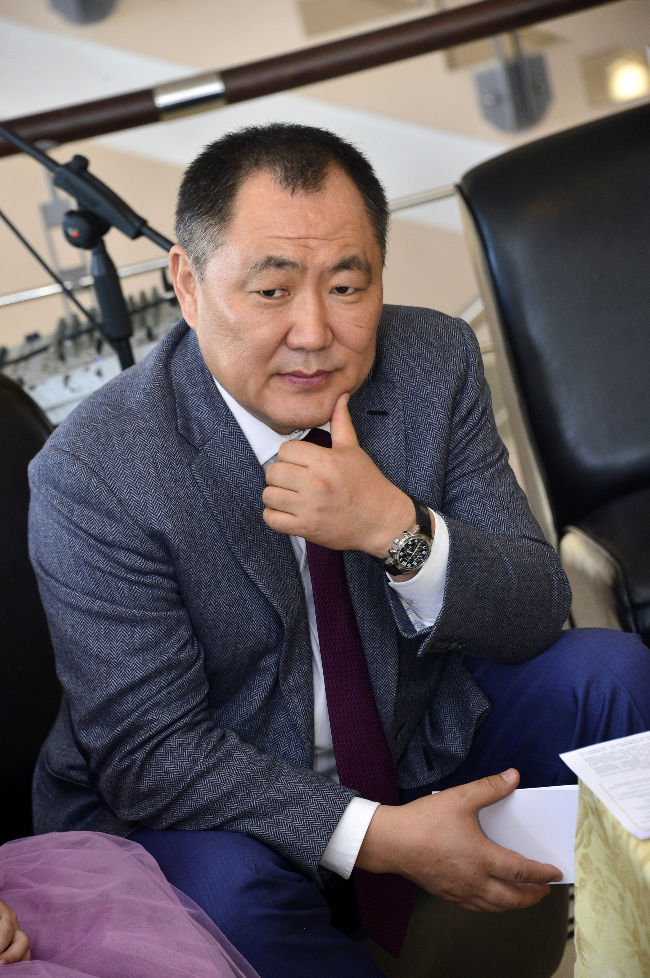 На встрече с успешными молодыми мамами Республики Тыва